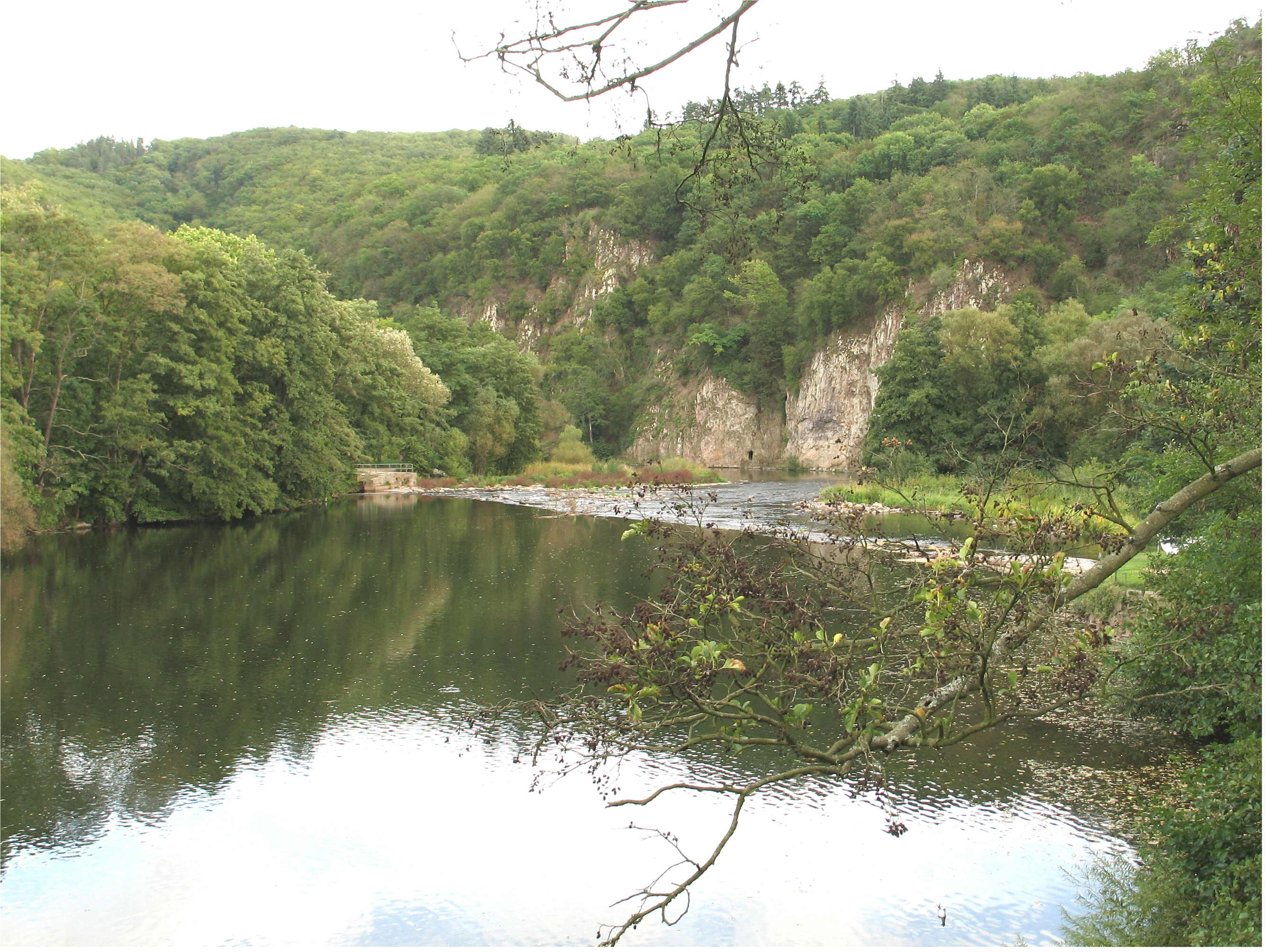 D'Nahe zu Bad Münster am Stein/Ebernburg.